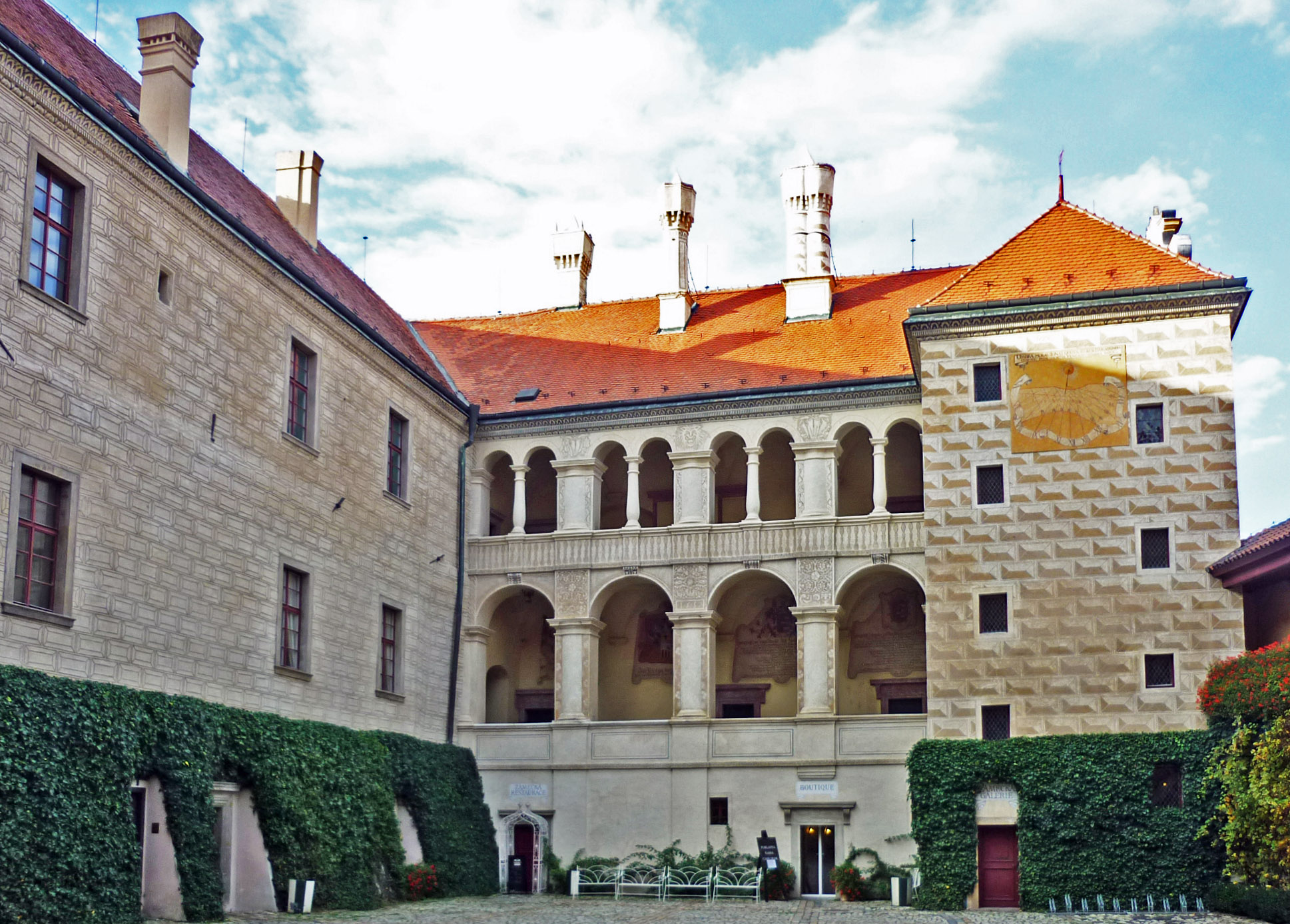 Lobkowicz-Schloss in Melnik